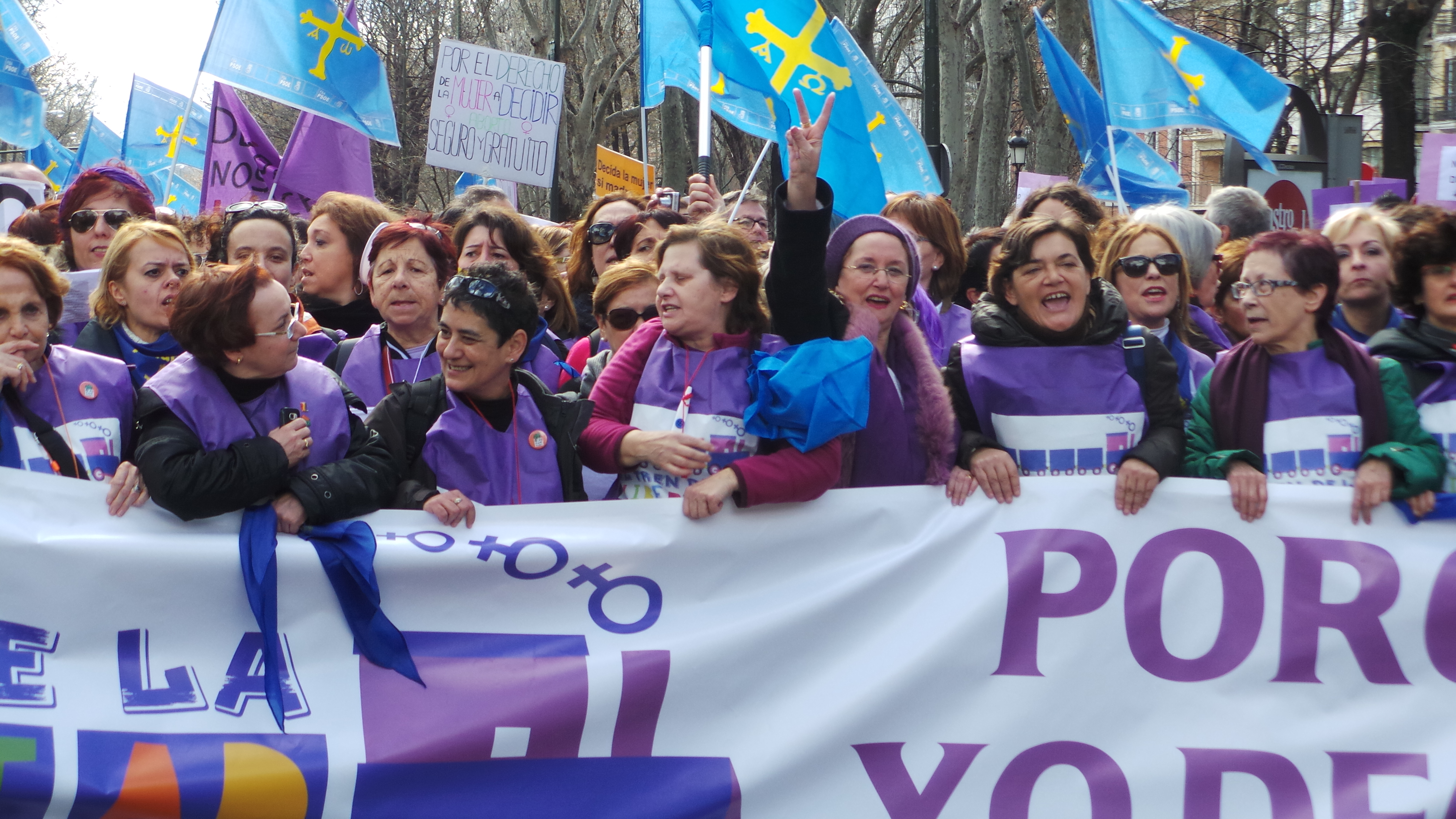 Tren de la Libertad. Manifestación a favor del derecho a decidir. Madrid Febrero 2014